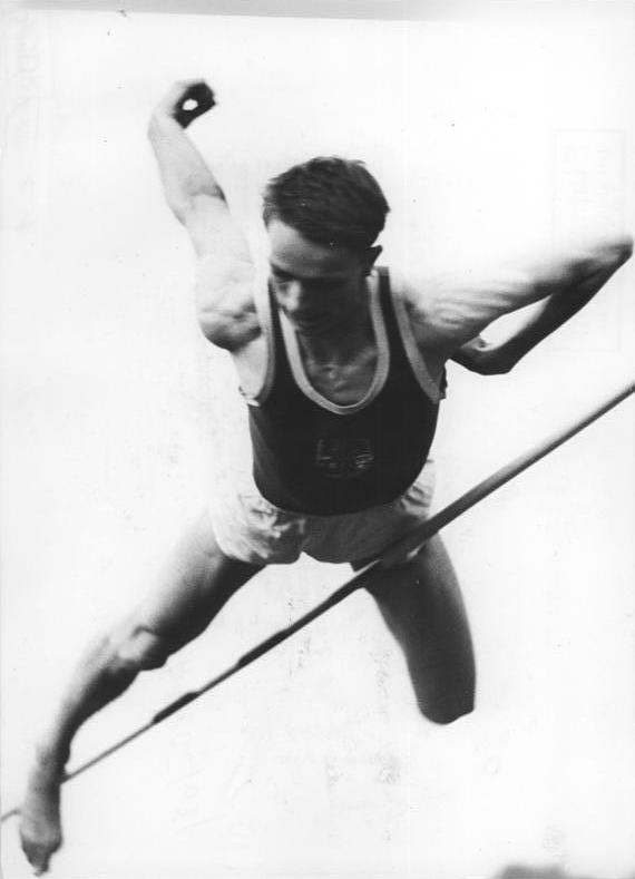 Gerd Dührkop Zentralbild Kohls-Wendorf 5.8.1962 Leichtathletiksportfest in Potsdam Im Potsdamer Leichtathletikstadion am Luftschiffhafen kam es am 4.8.1962 zu einer letzten Probe unserer Leichtathleten vor den Ausscheidungen gegen Westdeutschland in Prag und Malmö. UBz: Für das herausragendste Ergebnis sorgte Gerd Rübrkop (SC Empor Rostock) , der mit 2,13 m einen neuen deutschen Rekord im Hochsprung erzielte.